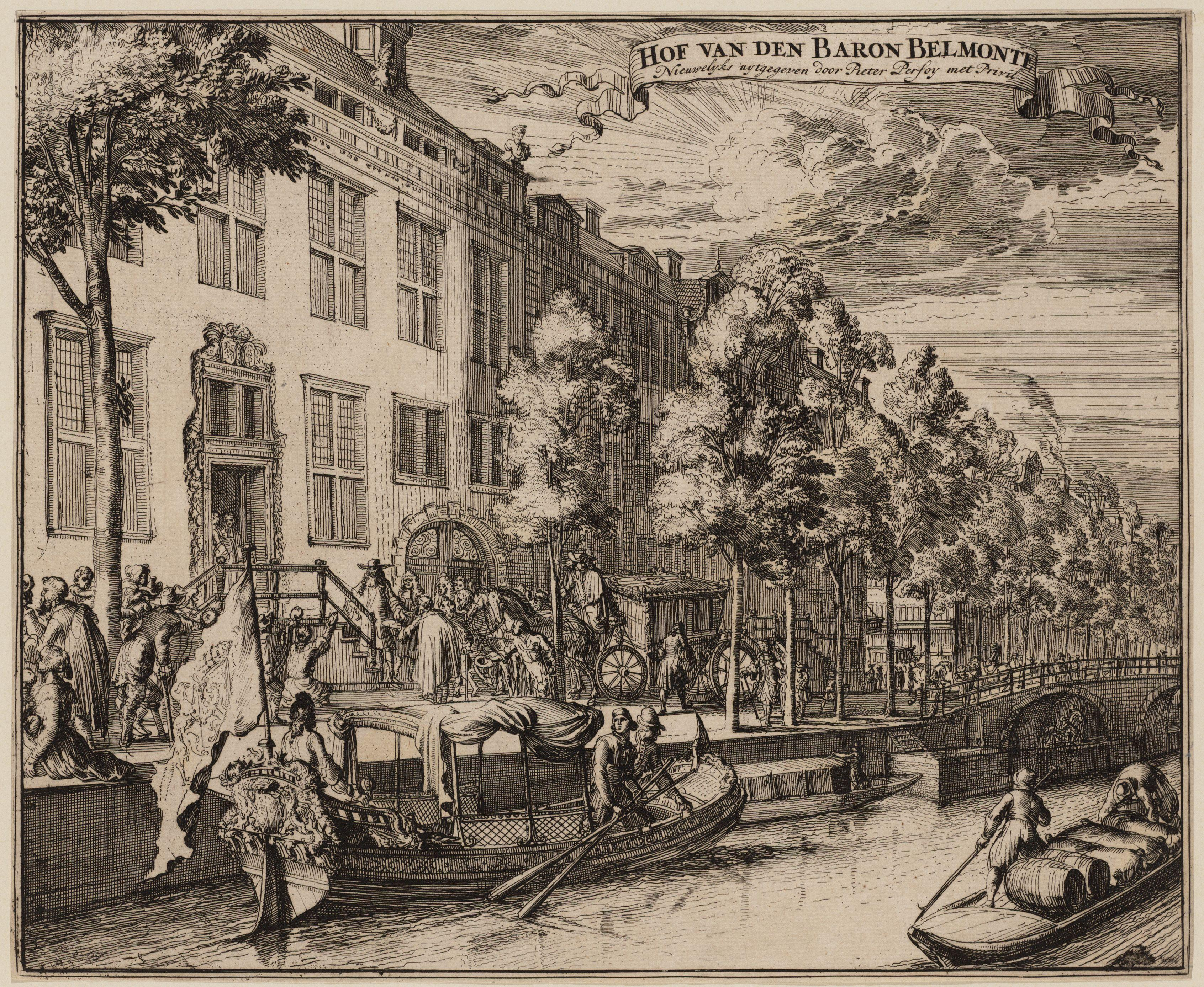 Beschrijving Hof van den Baron Belmonte Links vooraan Herengracht 586, van 1686 tot 1707 het huis van Manuel (alias Isaac) Nunes baron de Belmonte; gezien in de richting van de Utrechtsestraat. In de gracht een speeljacht. In de rij huizen tussen het huis van Belmonte en de Utrechtsestraat zijn diverse panden weggelaten. Afmetingen: 230 x 280 mm Documenttype prent Vervaardiger Hooghe, Romeyn de Collectie Collectie Atlas Dreesmann Datering 1686 t/m 1705 Geografische naam Herengracht Inventarissen Afbeeldingsbestand 010094005186